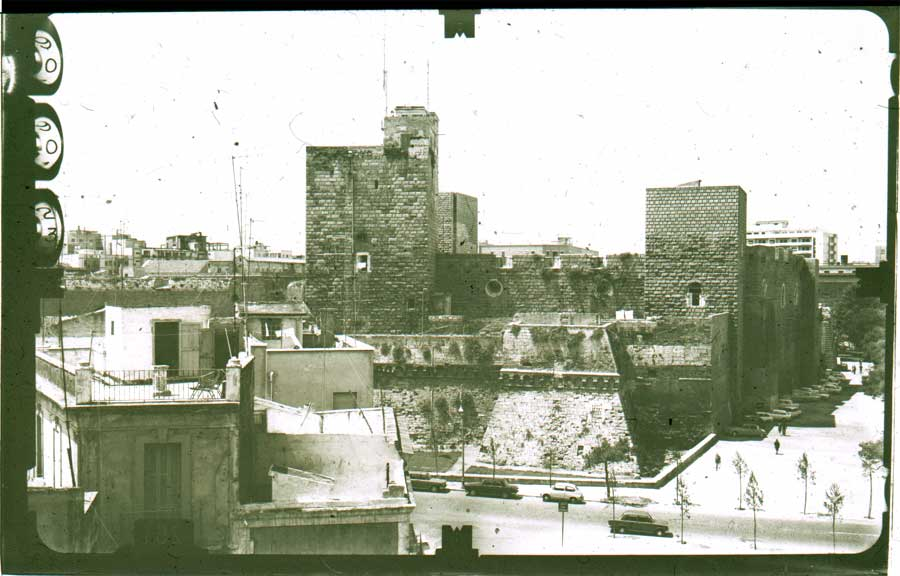 Fotogramma ripreso con il fototeotolite Wild P30